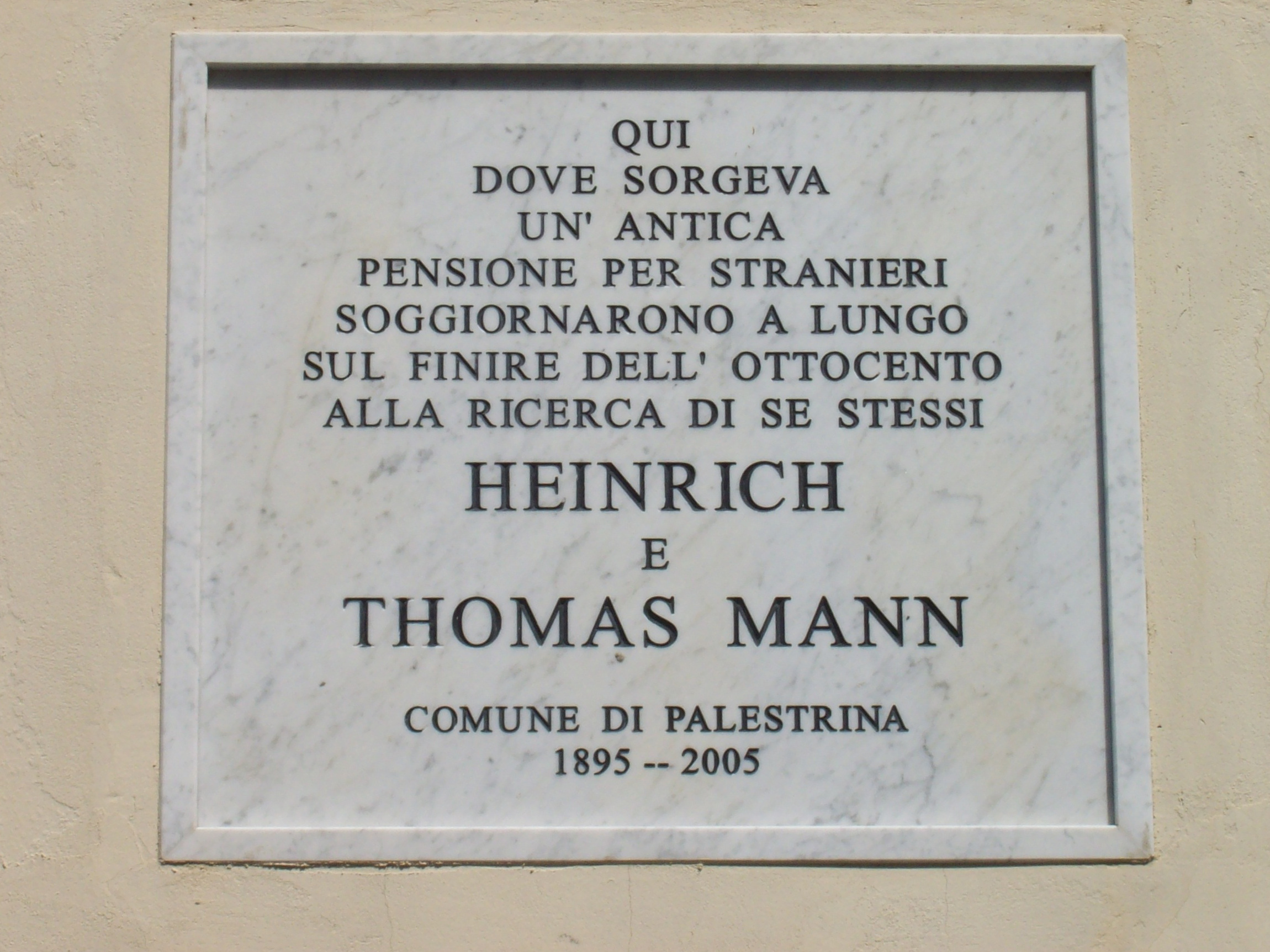 Targa commemorativa della presenza di Thomas Mann a Palestrina